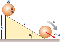 한국어 (조선): 굴림운동.